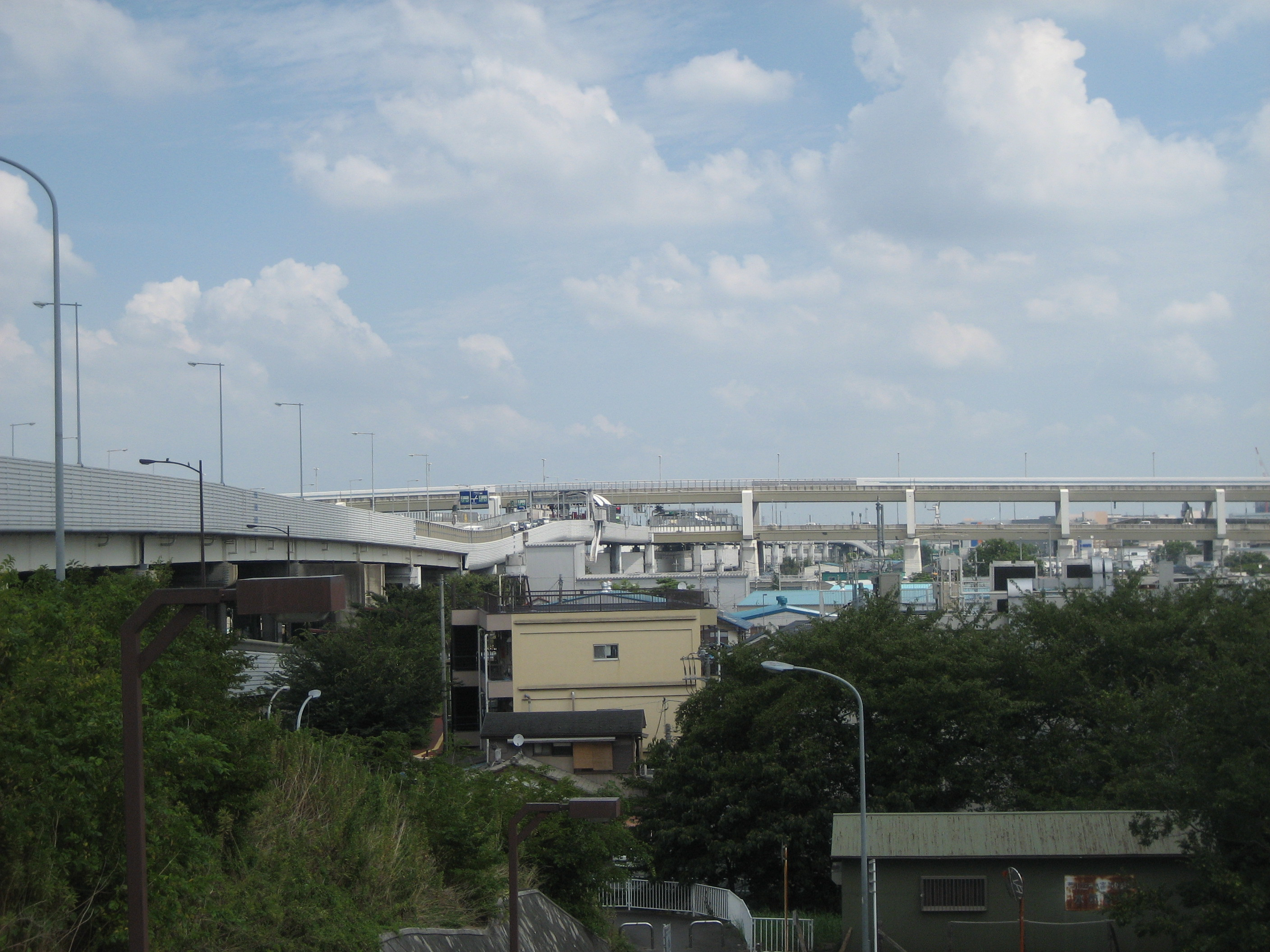 埼玉県戸田市美女木地区と美女木JCT（荒川土手から撮影）